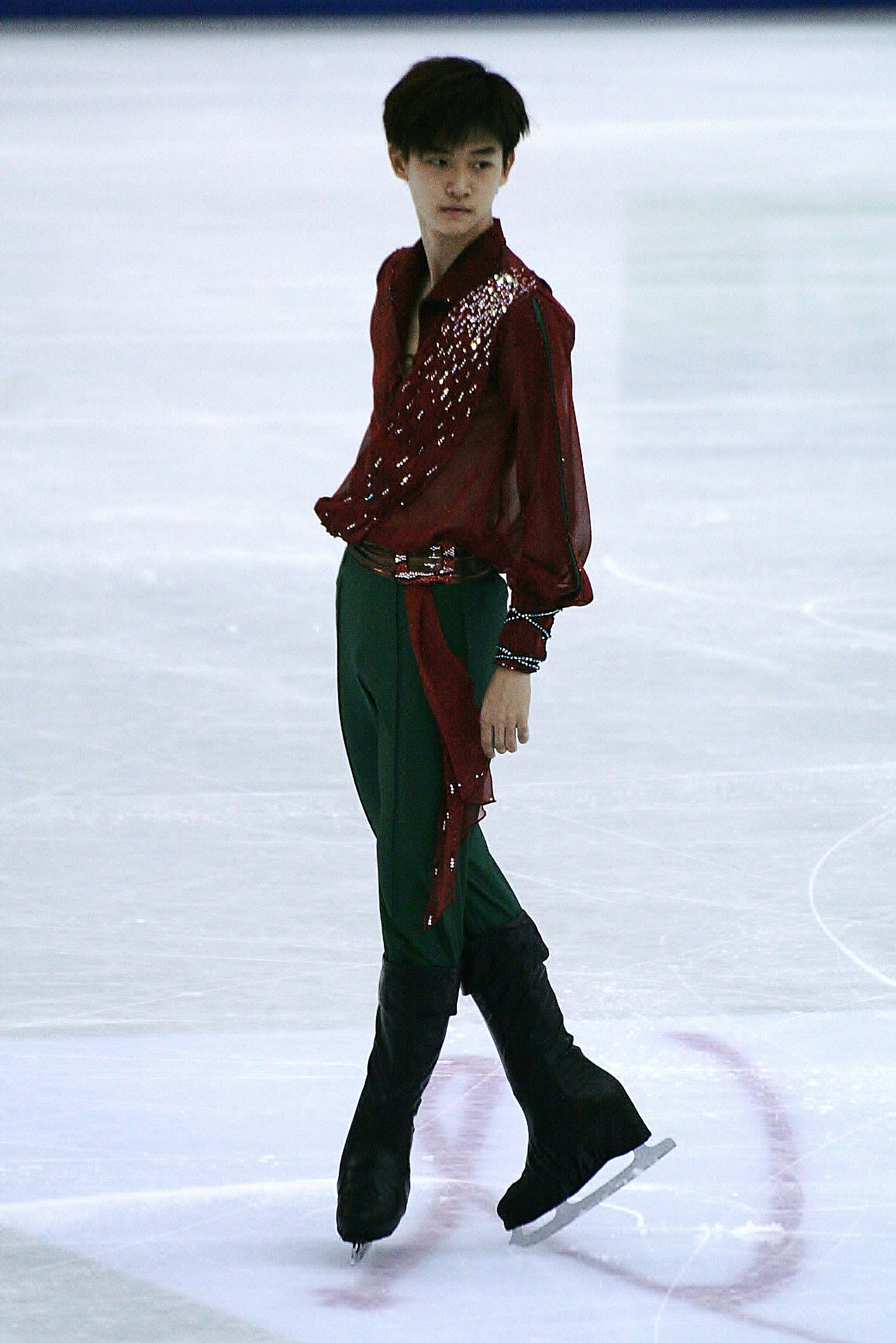 Ким Мин-Сёк (Южная Корея) на чемпионате мира по фигурному катанию 2012.